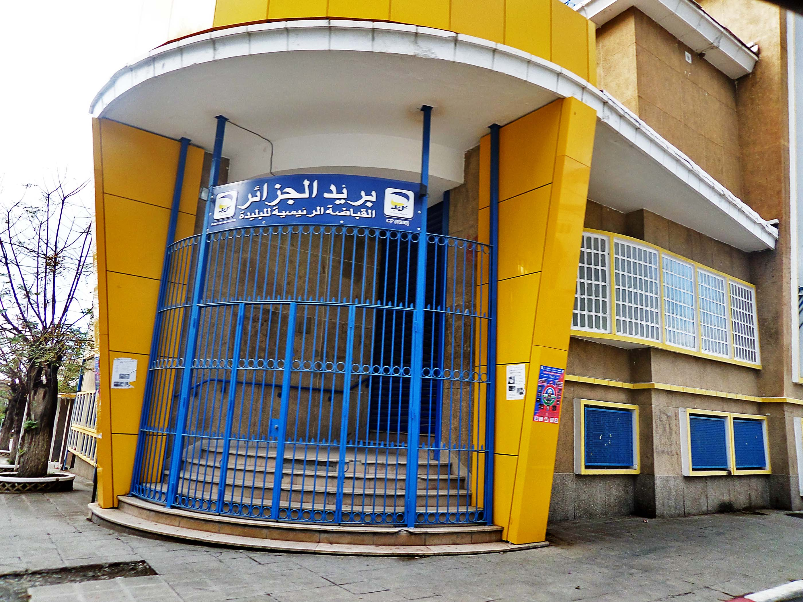 La Poste - Bab Essebt باب السبت